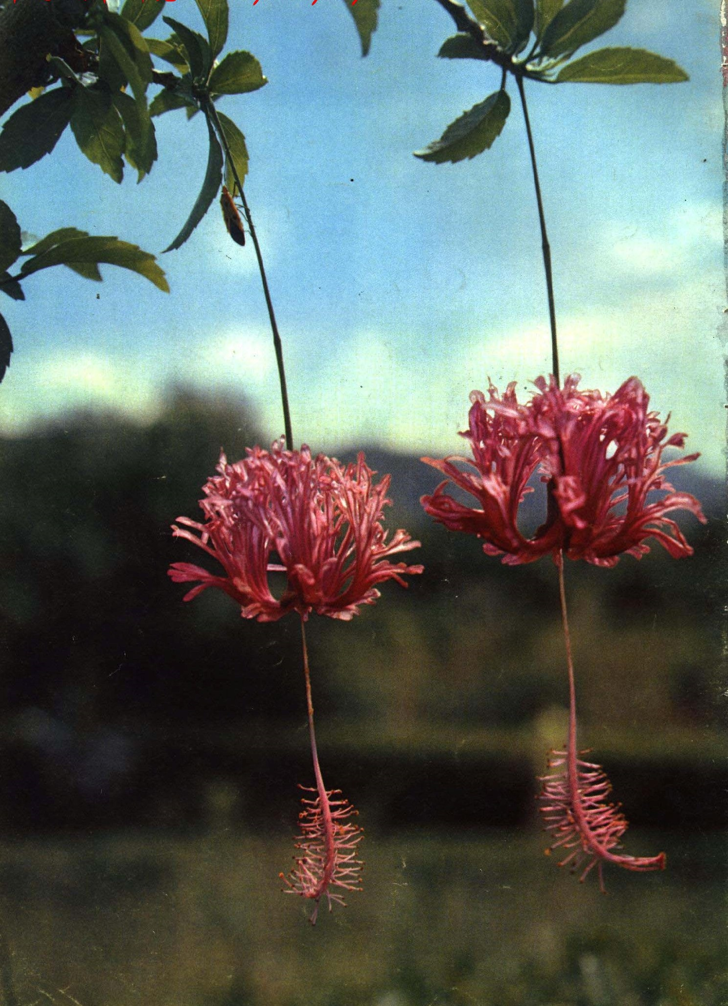 1965-9 1965 吊灯花